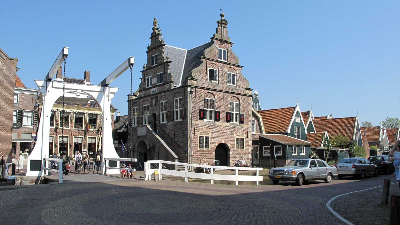 1483 De Rijp, Netherlands